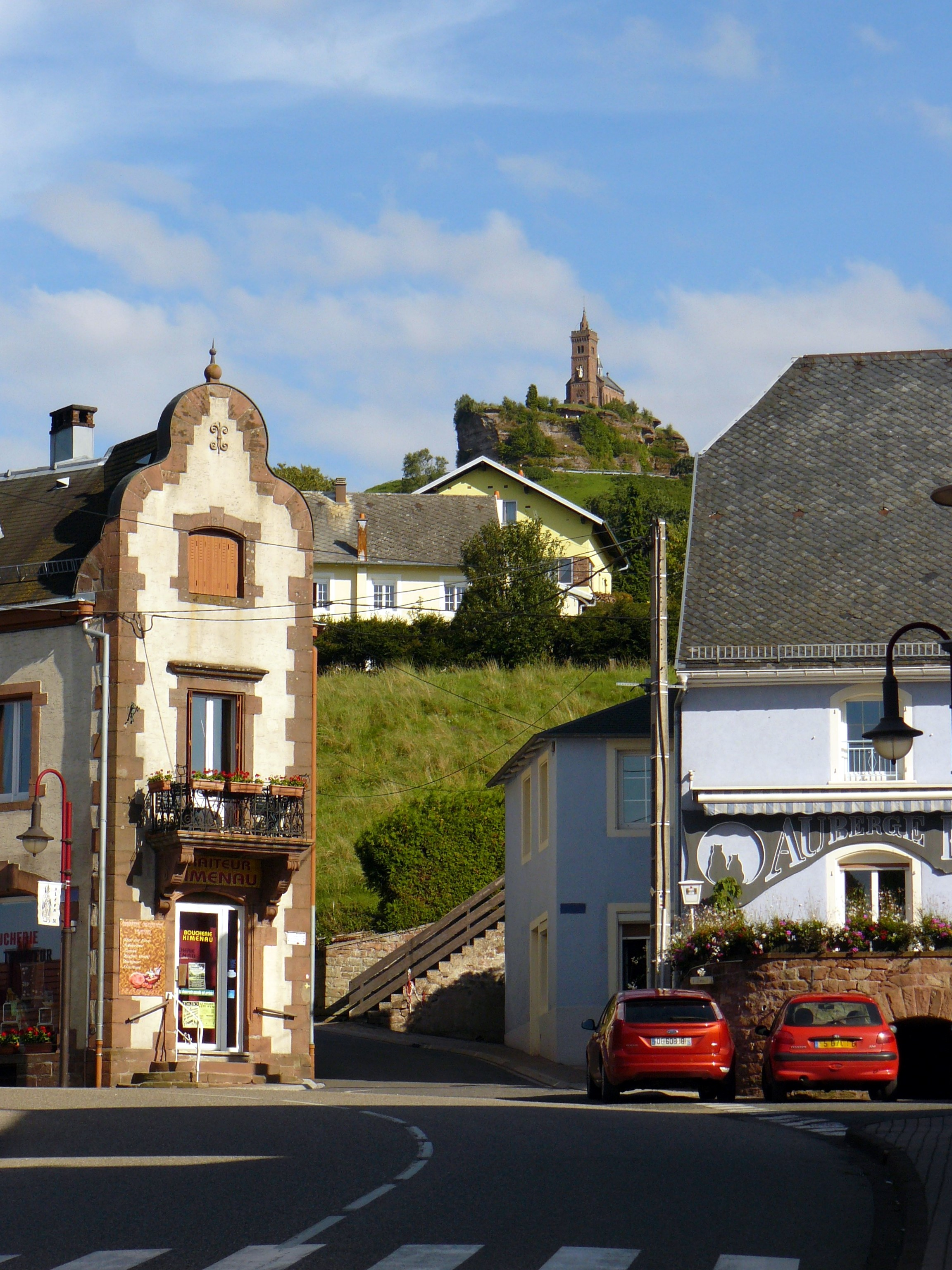 Le rocher de Dabo, vu depuis Dabo